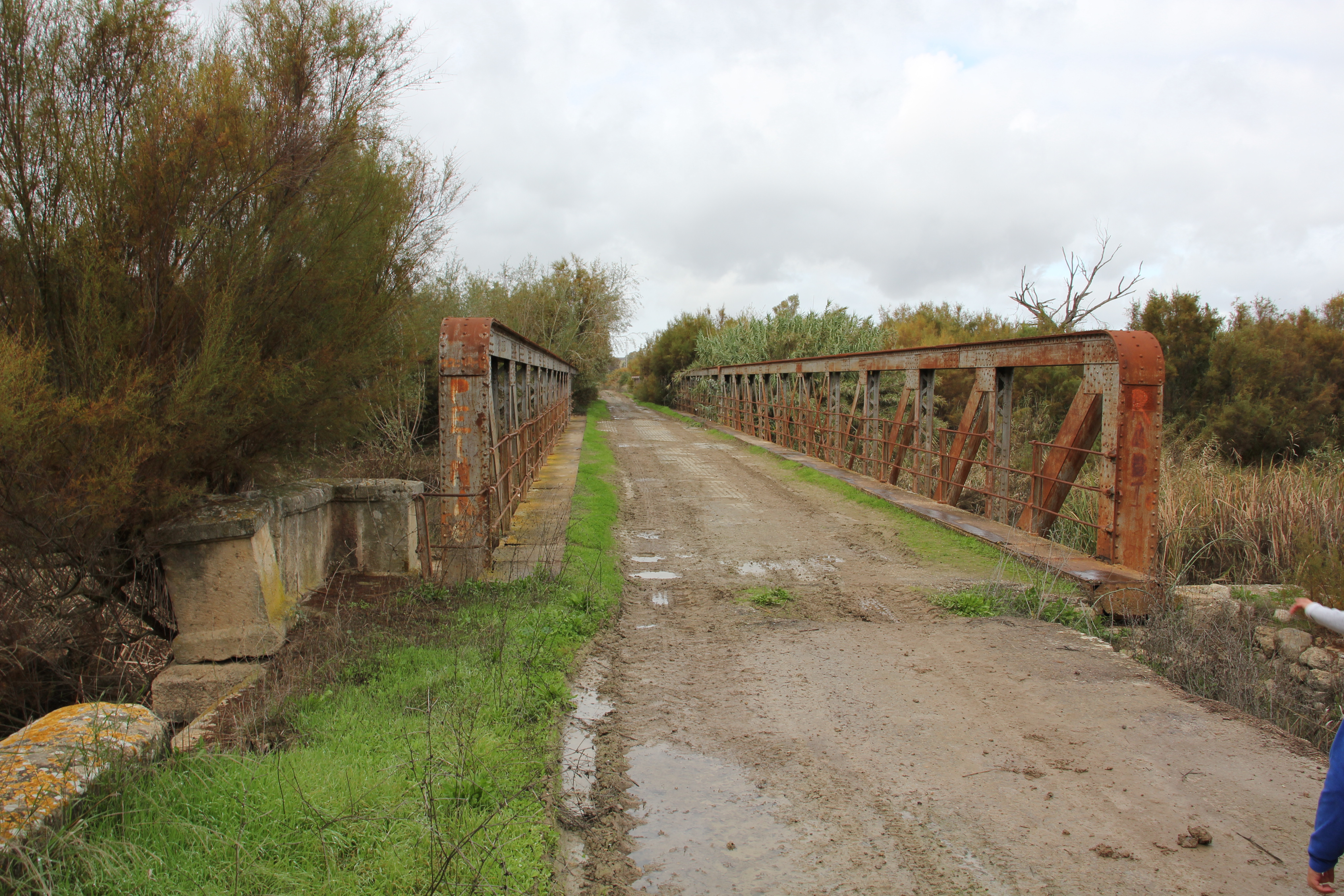 Sendero cola del embalse de Bornos (Andalucía, España)